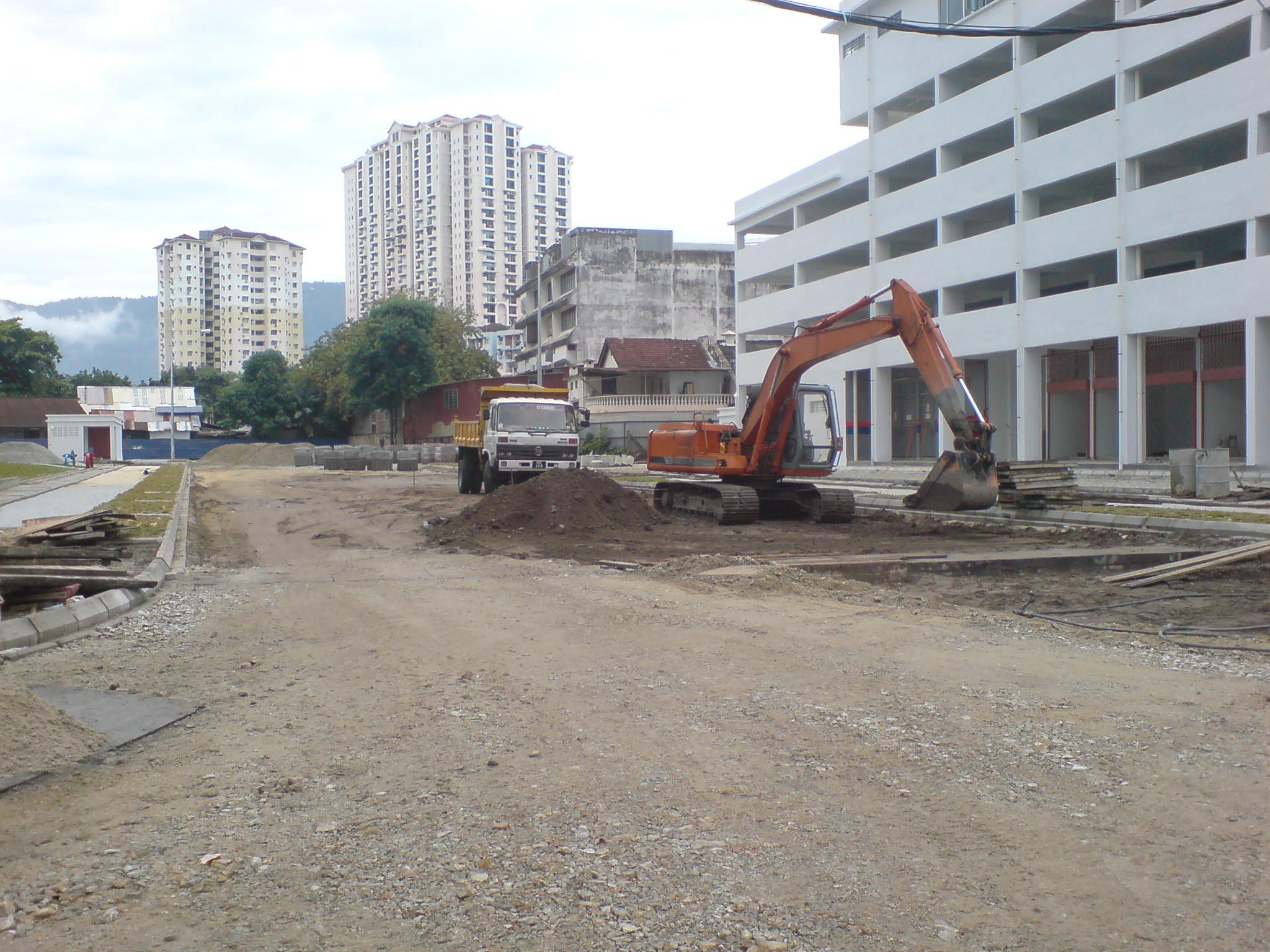 under pavement road